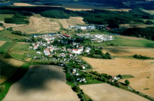 letecký pohled na obec Lom u Tachova